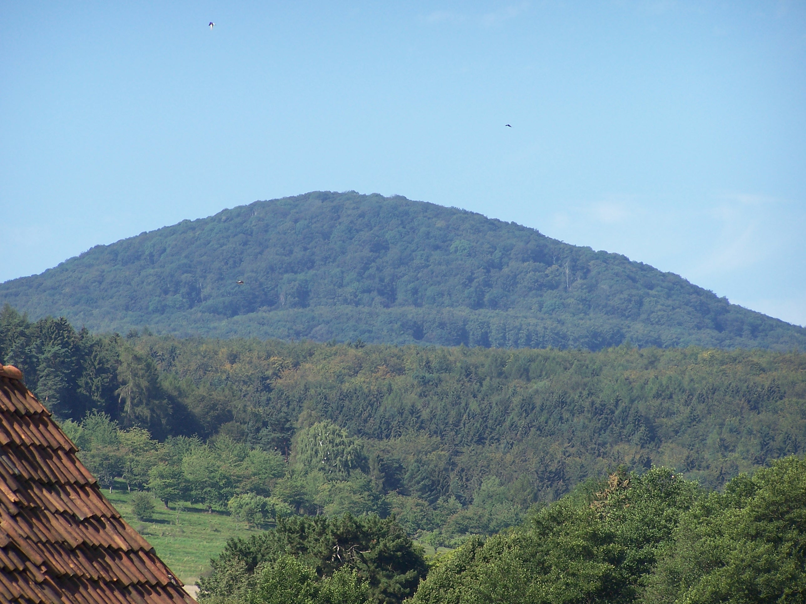 Der Baier aus Richtung Weilar.